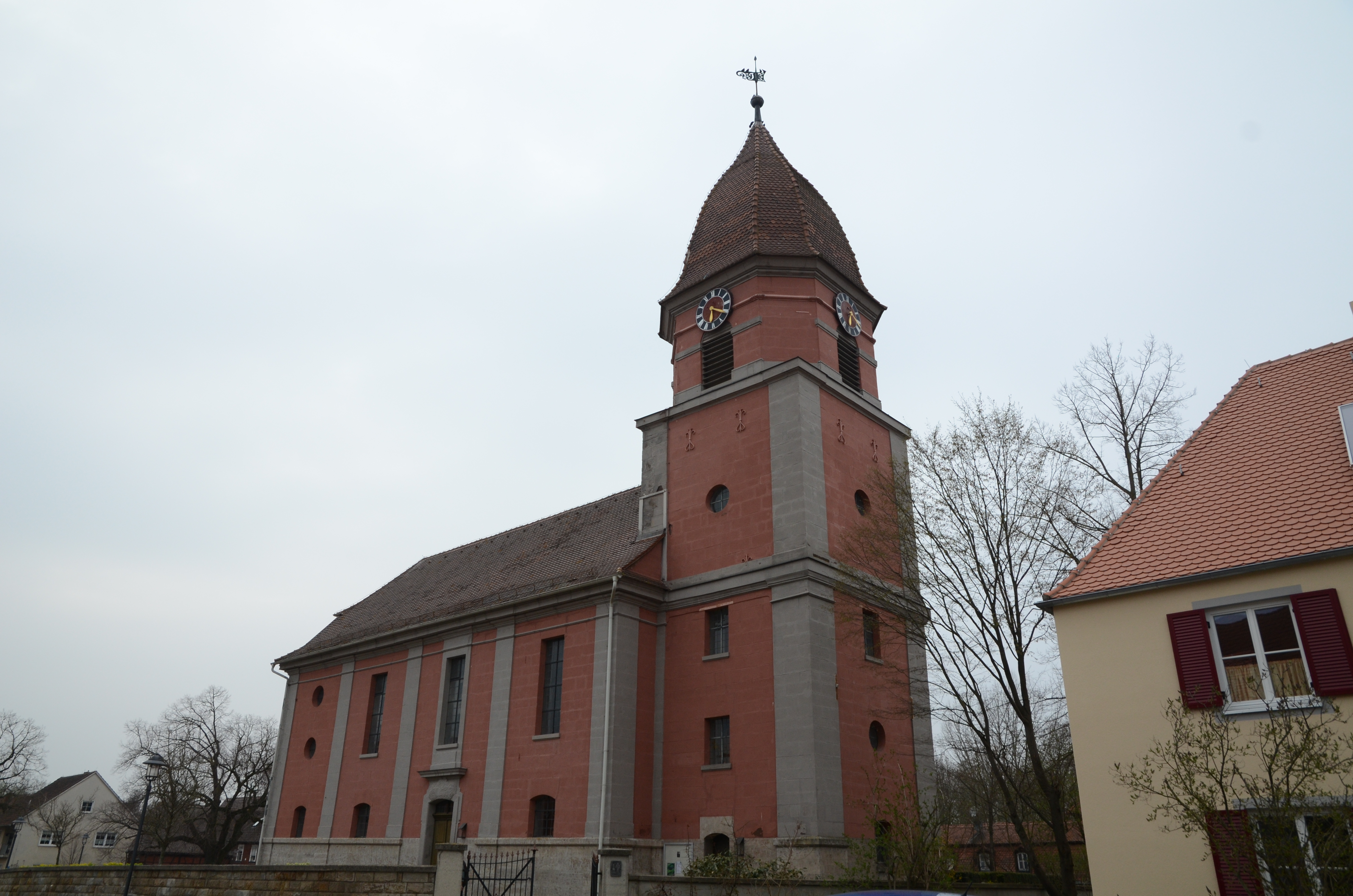 evang.-luth. Kirche St. Maria und Wendel in Illesheim